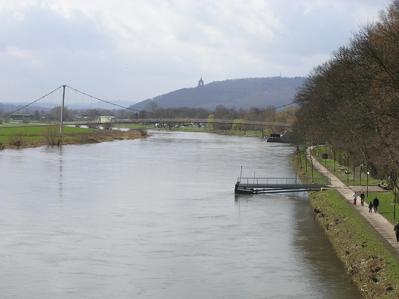 Blick vom westlichen Weserufer bei Minden (Westf.) in Nordrhein-Westfalen auf die Porta Westfalica im Süden. Links (außerhalb des Bildes) das Wesergebirge, rechts das Wiehengebirge. An dessen östlichem Abschluss das Kaiser-Wilhelm-Denkmal. Hinter der Hängebrücke am linken (vom Standpunkt rechten) Weserufer die Schiffmühle Minden an der Westfälischen Mühlenstraße und am Weserradweg.